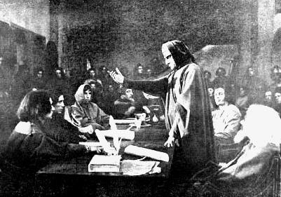 Dante nella vita e tempi suoi fotogramma - regia Domenico Gaido, prod Visioni Italiane Storiche, Firenze, 1925